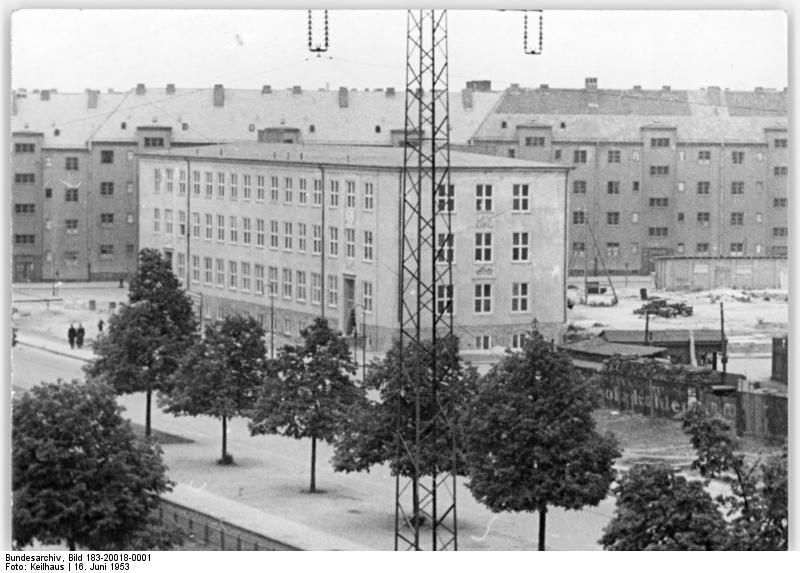 Berlin, Wisbyer Straße Poliklinik Zentralbild Keilhaus 20018 16.6.1953 Neue Poliklinik in Berlin Im Juni 1953 wurde in der Wisbyer Straße an der Grenze zwischen den beiden Berliner Bezirken Prenzlauer Berg und Pankow eine Poliklinik eröffnet, die für beide Bezirke zuständig ist. Die Klinik hat Abteilungen für innere Krankheiten, Frauenleiden, Chirurgie, Kinderkrankheiten und Zahnheilkunde, sowie für Röntgenaufnahmen, Bestrahlungen, medizinische Bäder und Massagen.